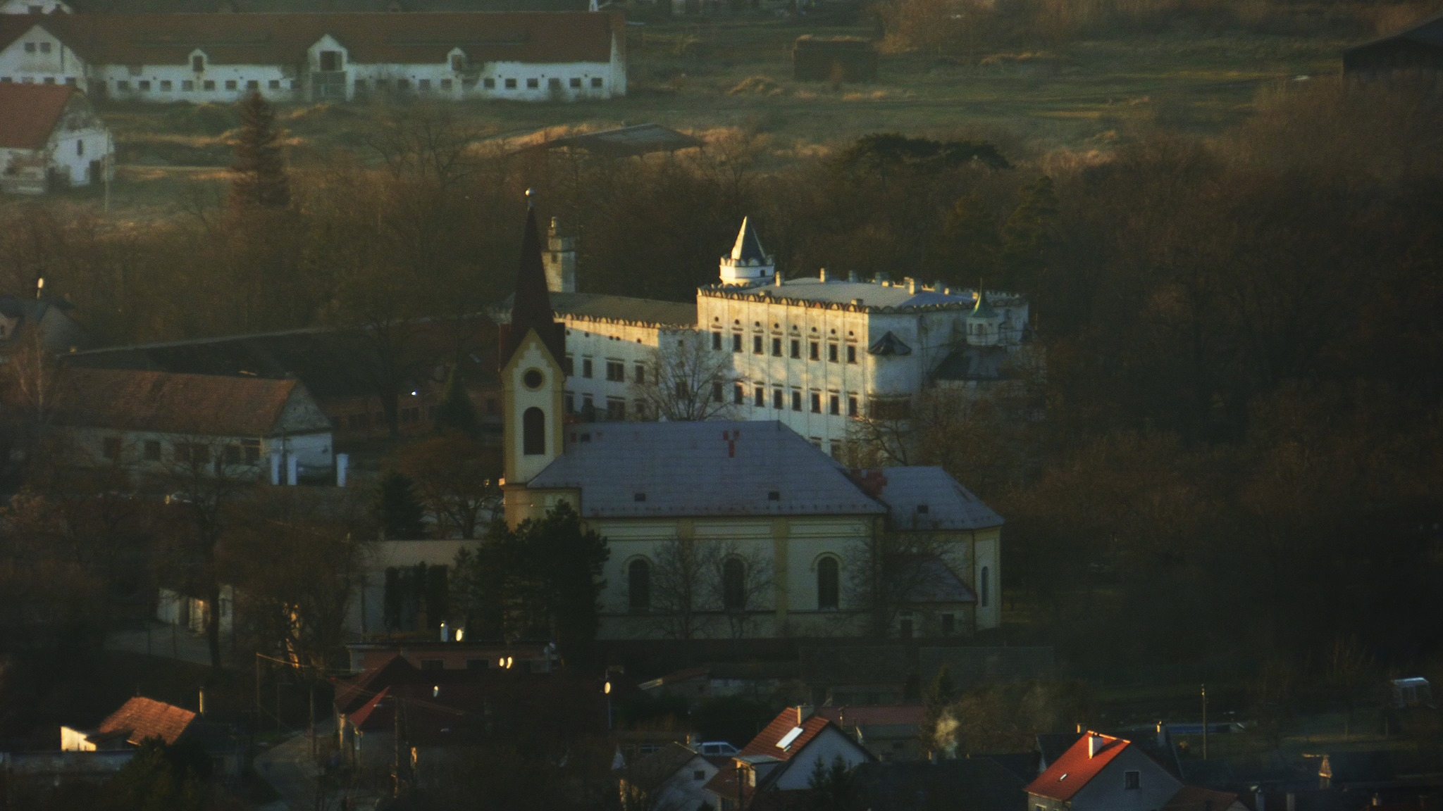 Pohľad na kostol a kaštieľ v Moravanoch nad Váhom